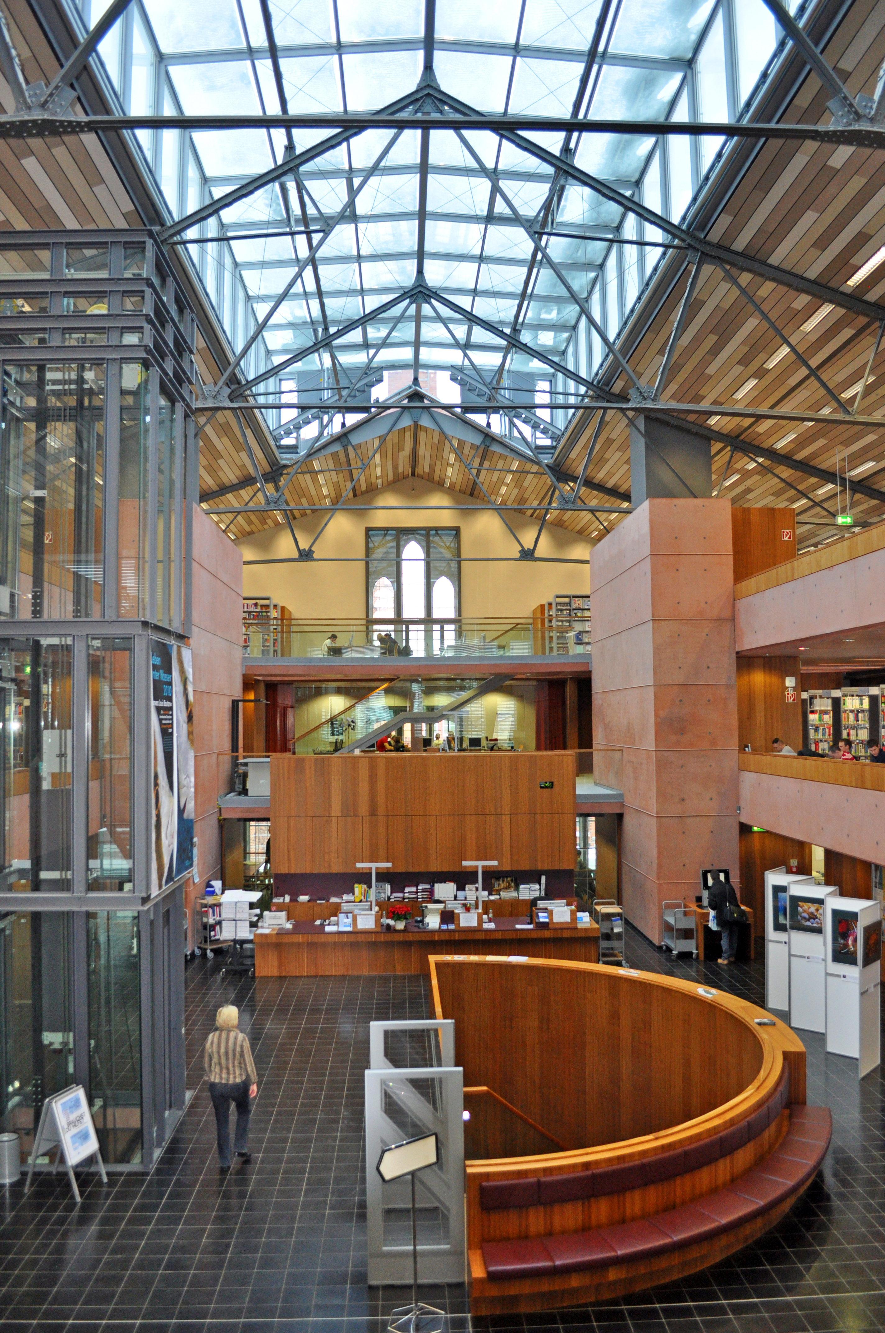 Bibliothek der Technischen Hochschule Wildau